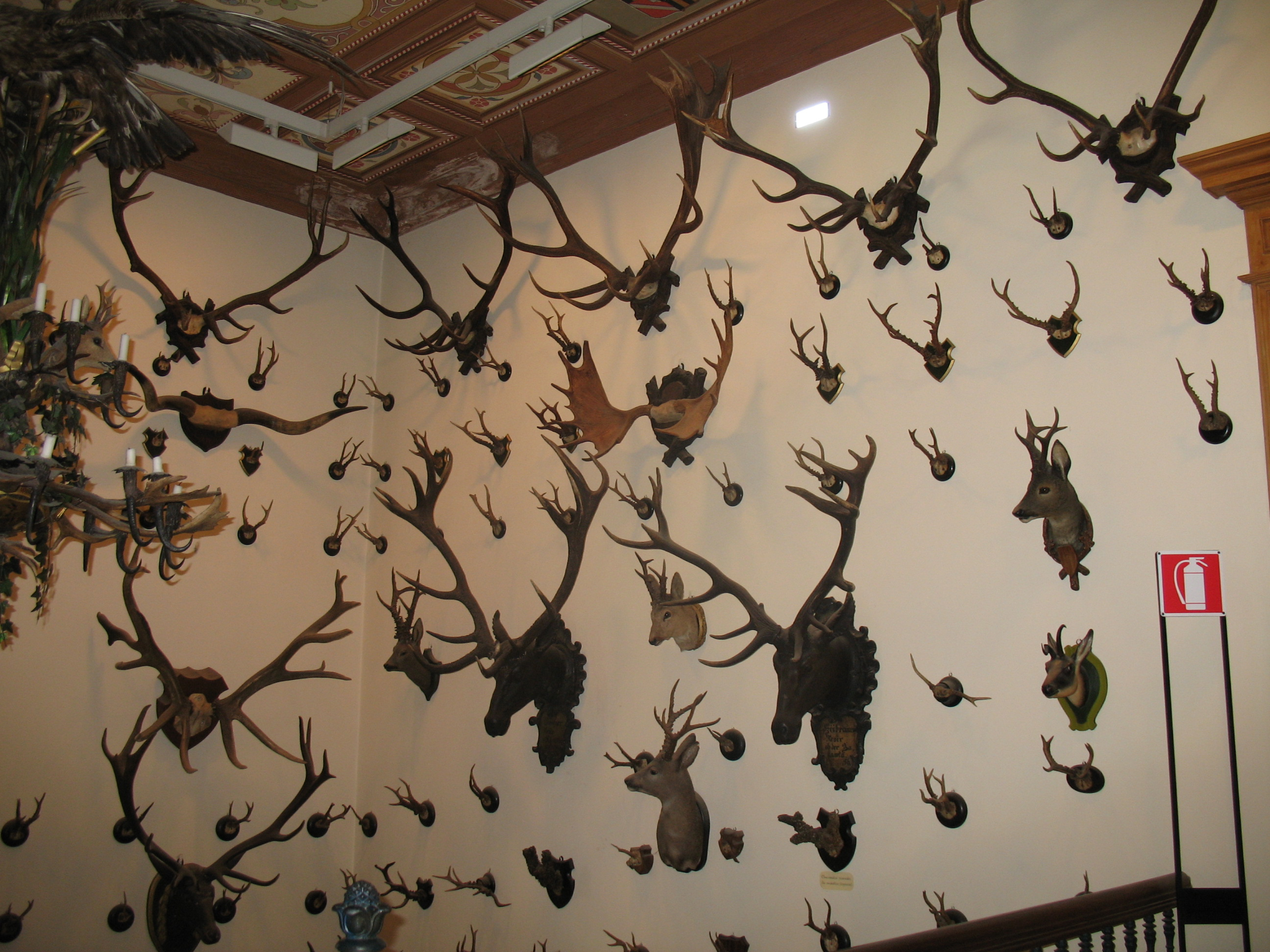 Immagine da Gressoney-Saint-Jean, Val d'Aosta - Museo Regionale della Fauna Alpina - Alpenfaunamuseum "Beck-Peccoz" - cervidae